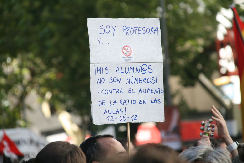 Huelga General (2012-11-14) 17